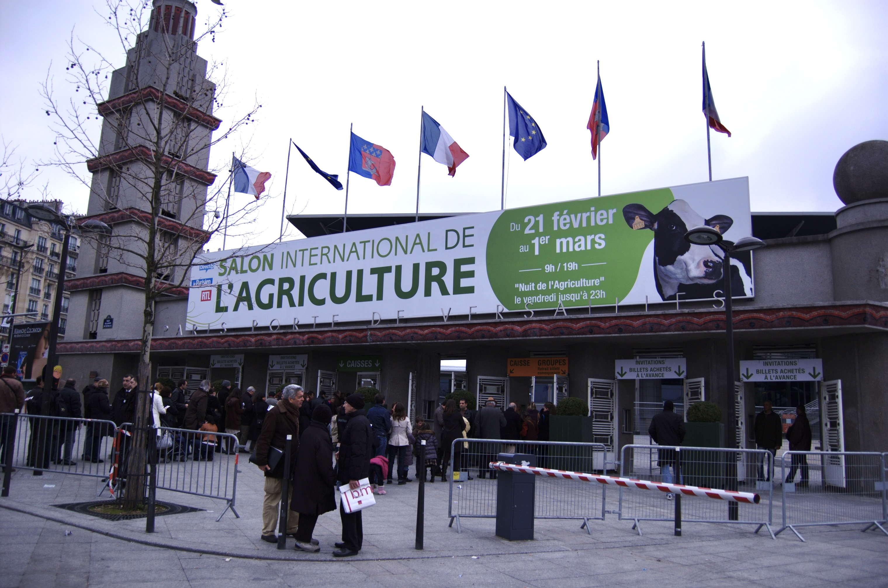 Entrée du Parc des expositions de la porte de Versaille lors du Salon international de l'agriculture 2009 - Paris - France - 22 février 2009.